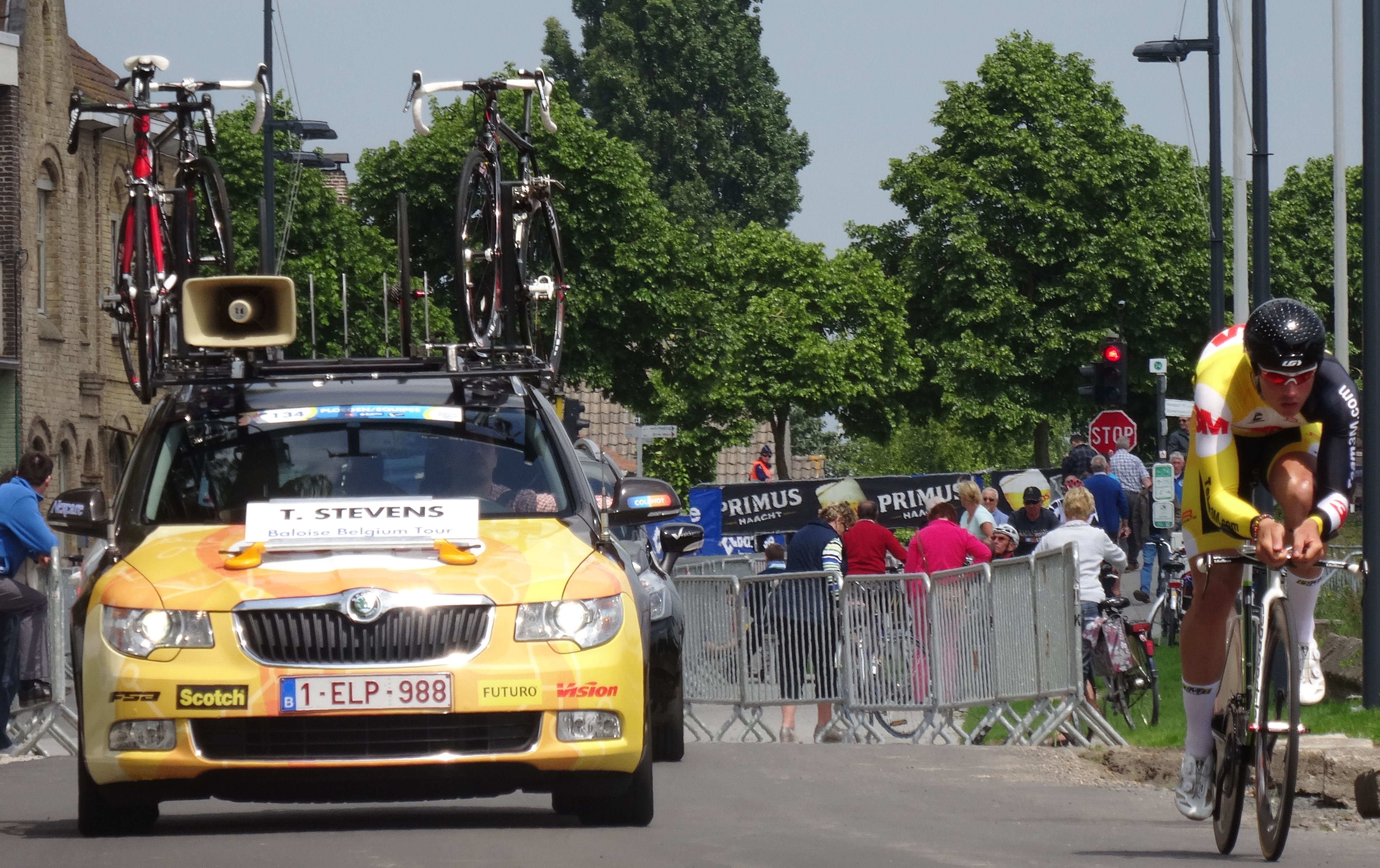 Reportage photographique réalisé le vendredi 30 mai à l'occasion du contre-la-montre individuel de la troisième étape du Tour de Belgique 2014 à Dixmude, Belgique.